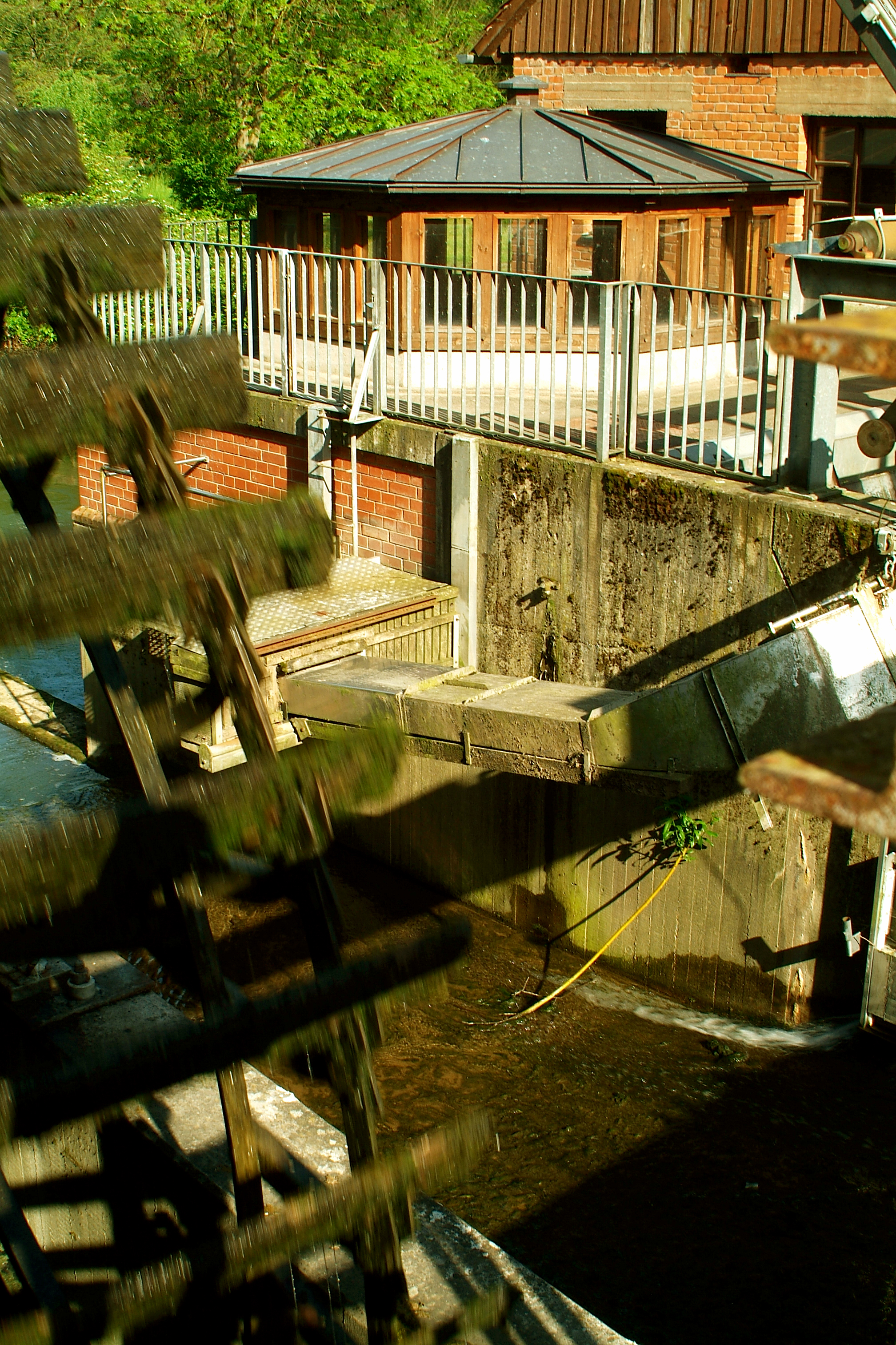 Auswahl von Ansichten aus Emmerthal-Hämelschenburg, die Ortschaft rund um Schloss Hämelschenburg mit ihren jahrhundertealten Geschichten bis in die Gegenwart.